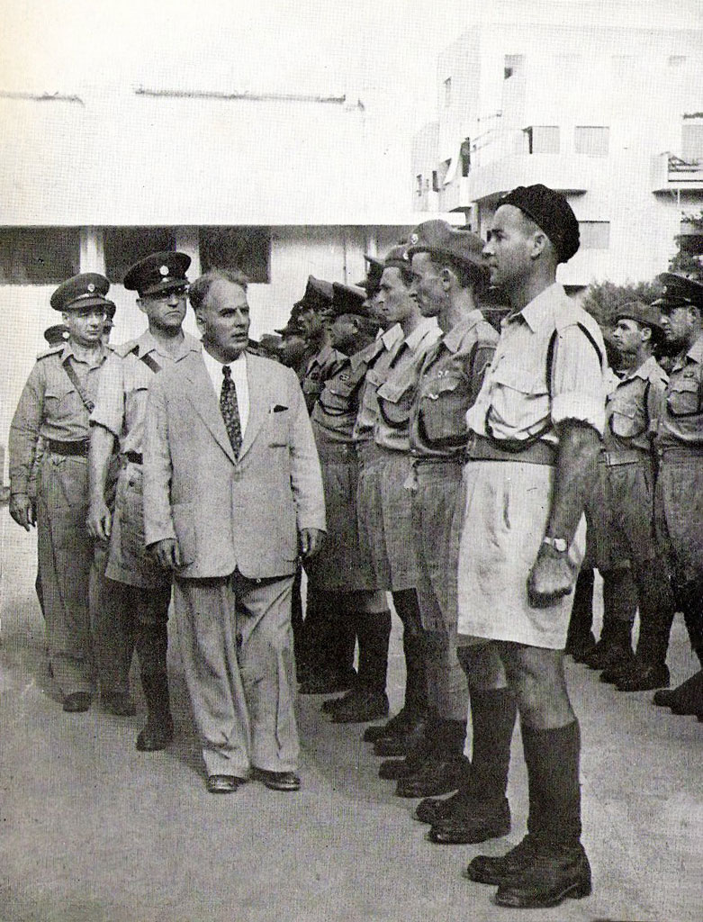 שר המשטרה he:בכור-שלום שטרית סוקר מסדר שוטרים בחברת he:מפכ"ל המשטרה he:יחזקאל סהר. השוטר הראשון, במכנסי החאקי הקצרים והכומתה השחורה, הוא אברהם מלאך.